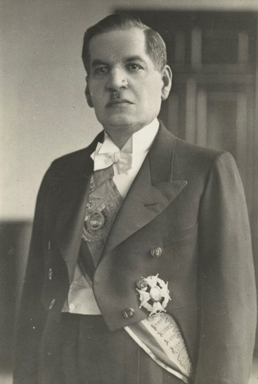 Andrés F Córdova, presidente de Ecuador (1939-1940).